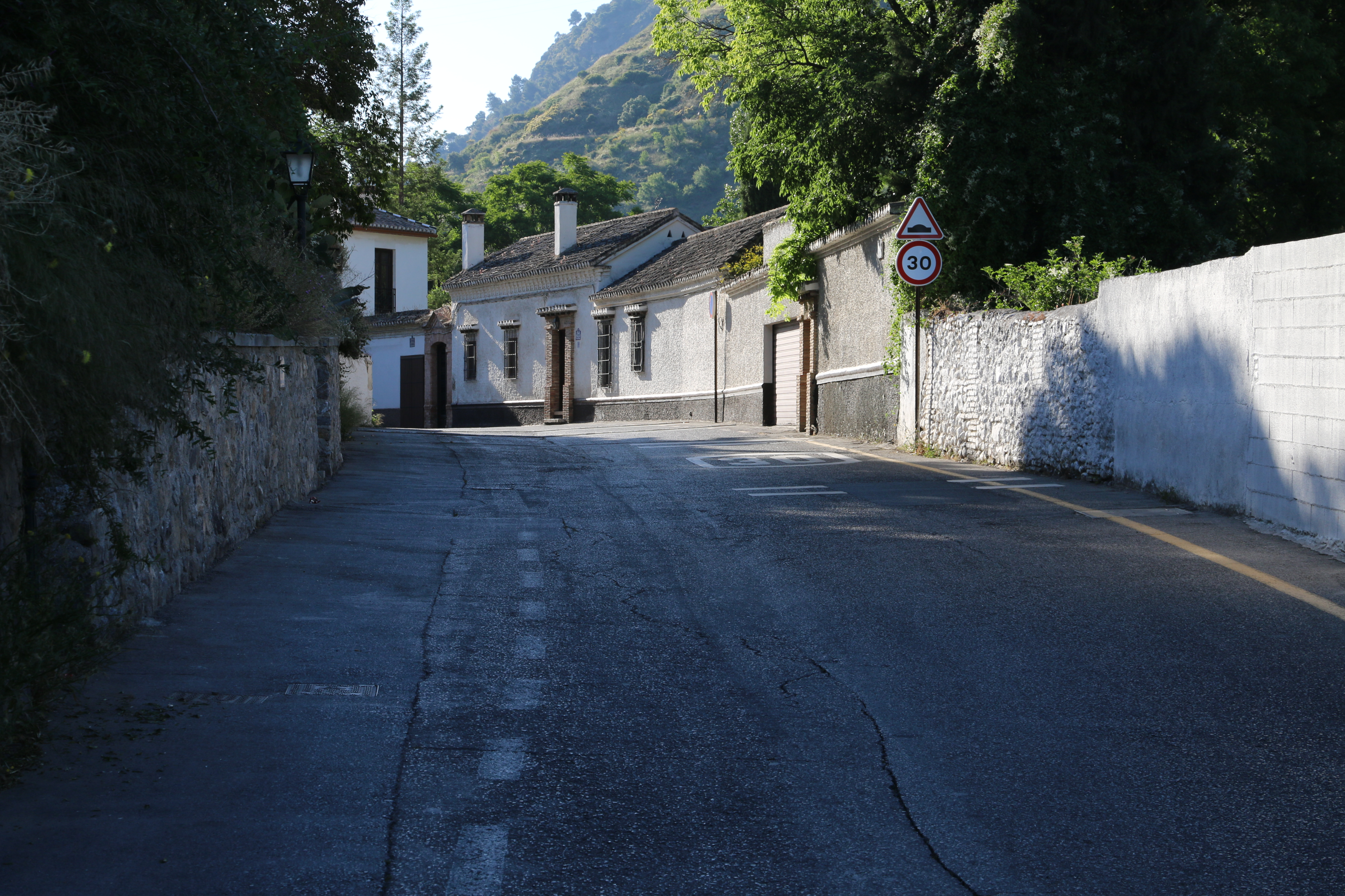 a road from sacromonte in granada 2016